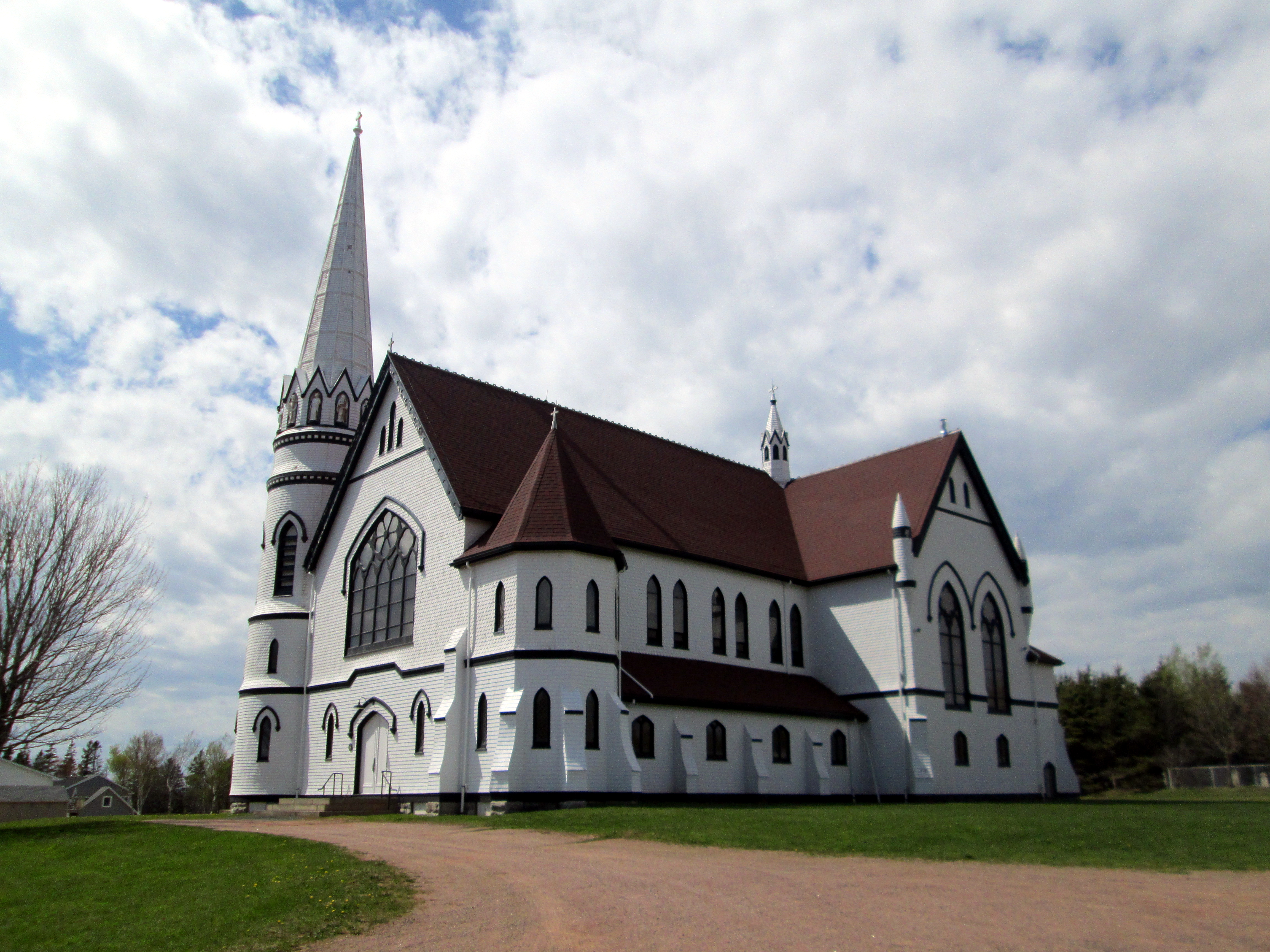 May 21, 2018